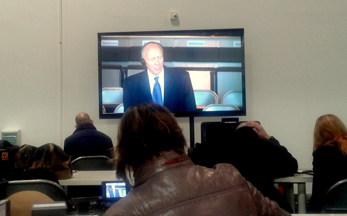 O capitán Apóstolos Mangouras declara no xuízo do Prestige.